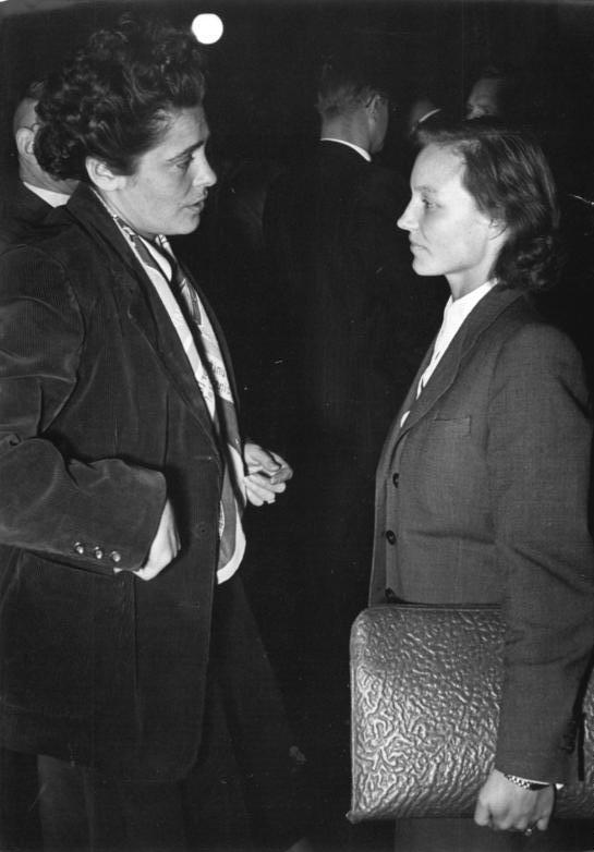 Illus/Sturm 31.10.51 13. und 14. Sitzung der Volkskammer Die Volkskammer der DDR trat am 31.10.51 und 1.11.51 zu ihrer 13. und 14. Sitzung zusammen, um u.a. über das "Gesetz über den Fünfjahresplan zur Entwicklung der Volkswirtschaft der Deutschen Demokratischen Republik", den Rechenschaftsbericht der Regierung über die Einnahmen der Republik und ihre Verwendung für das Rechnungsjahr 1950" und das "Gesetz über die Deutsche Notenbank" zu beraten. UBz: Volkskammerabgeordnete Margot Feist und Volkskammerabgeordneter Baender